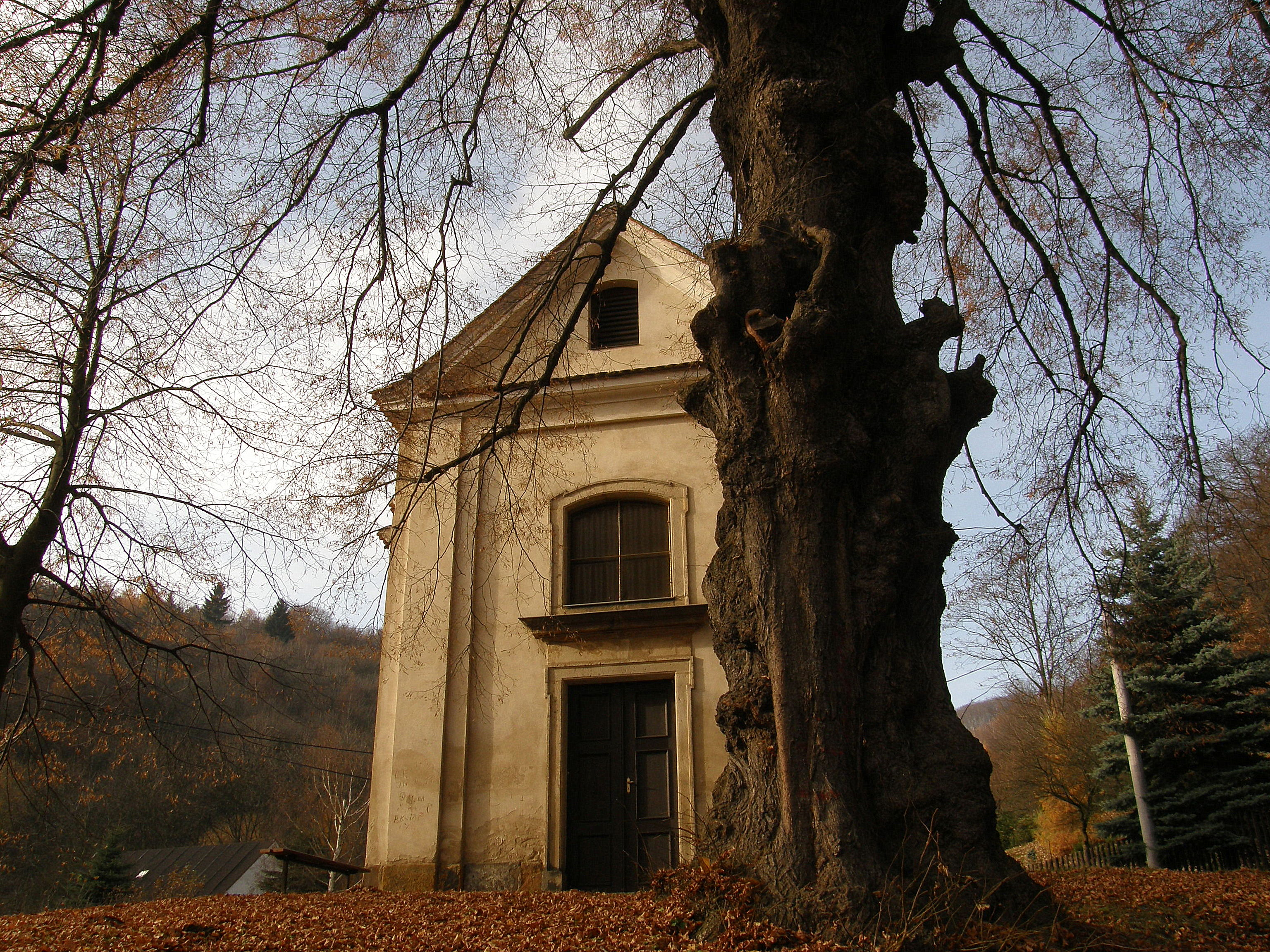 Kaple po Hradem Osek